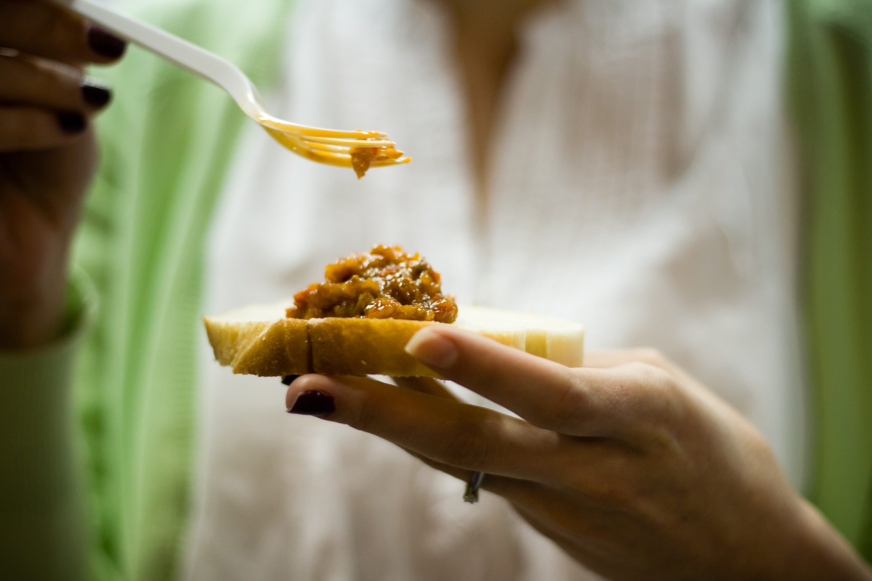 Zacuscă